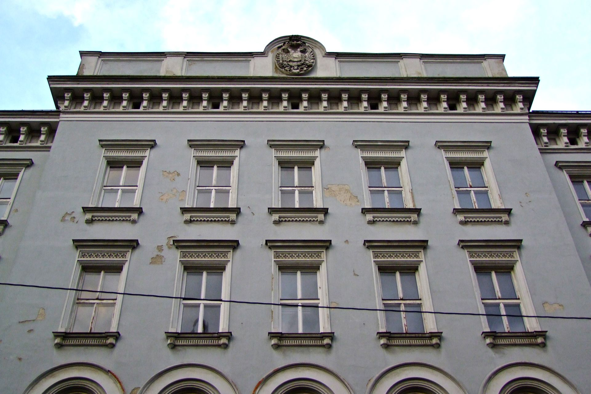 Finanzlandesdirektion, ehem. Hauptzollamt